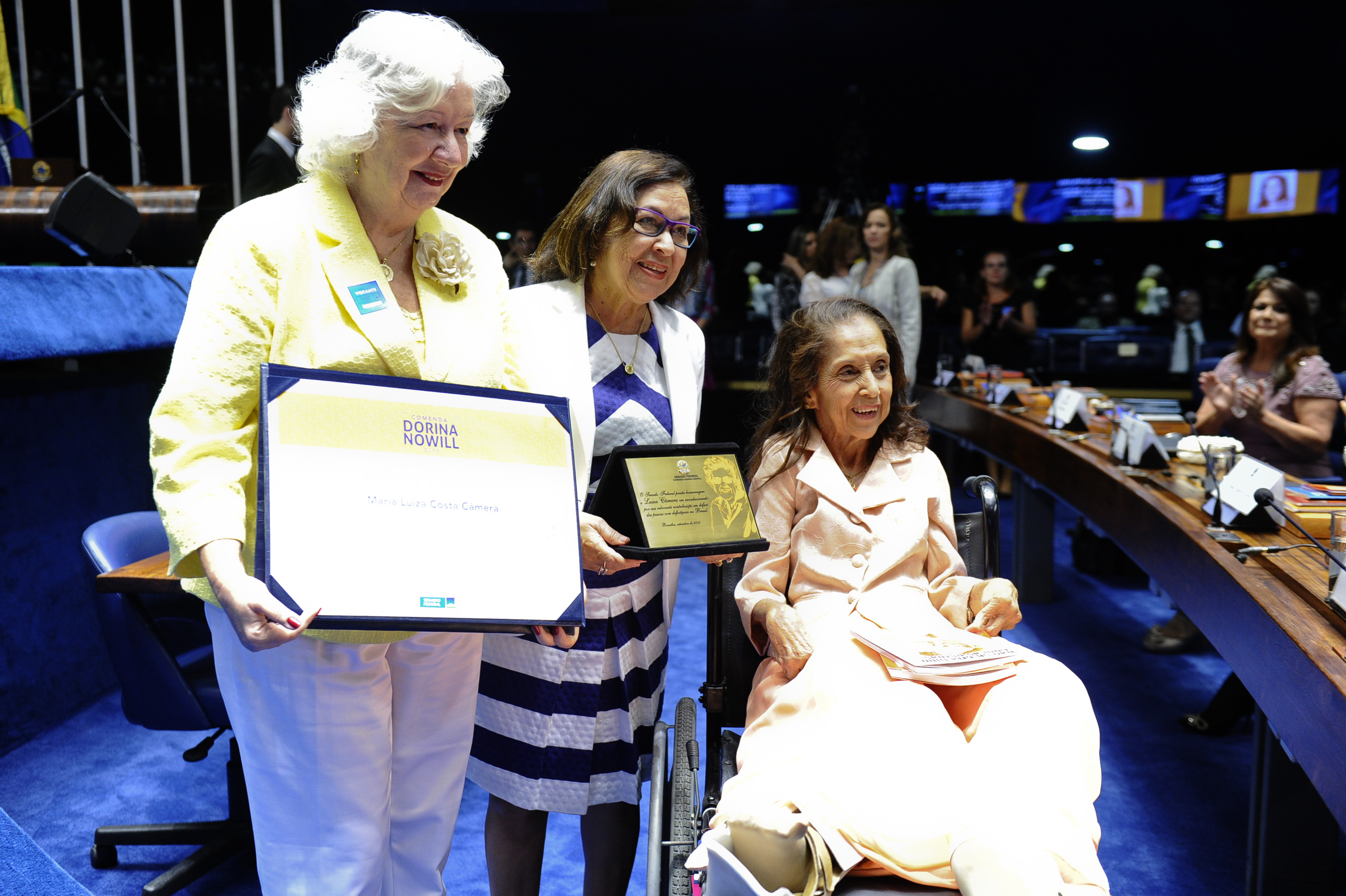 Plenário do Senado durante sessão especial destinada a comemorar o Dia Nacional de Luta das Pessoas com Deficiência e a entrega da Comenda Dorina Gouveia Nowill, em sua 1ª edição. Presidente da Comenda Dorina Nowill, senadora Lídice da Mata (PSB-BA) entrega comenda para agraciada Maria Luiza Costa Câmera. Foto: Marcos Oliveira/Agência Senado